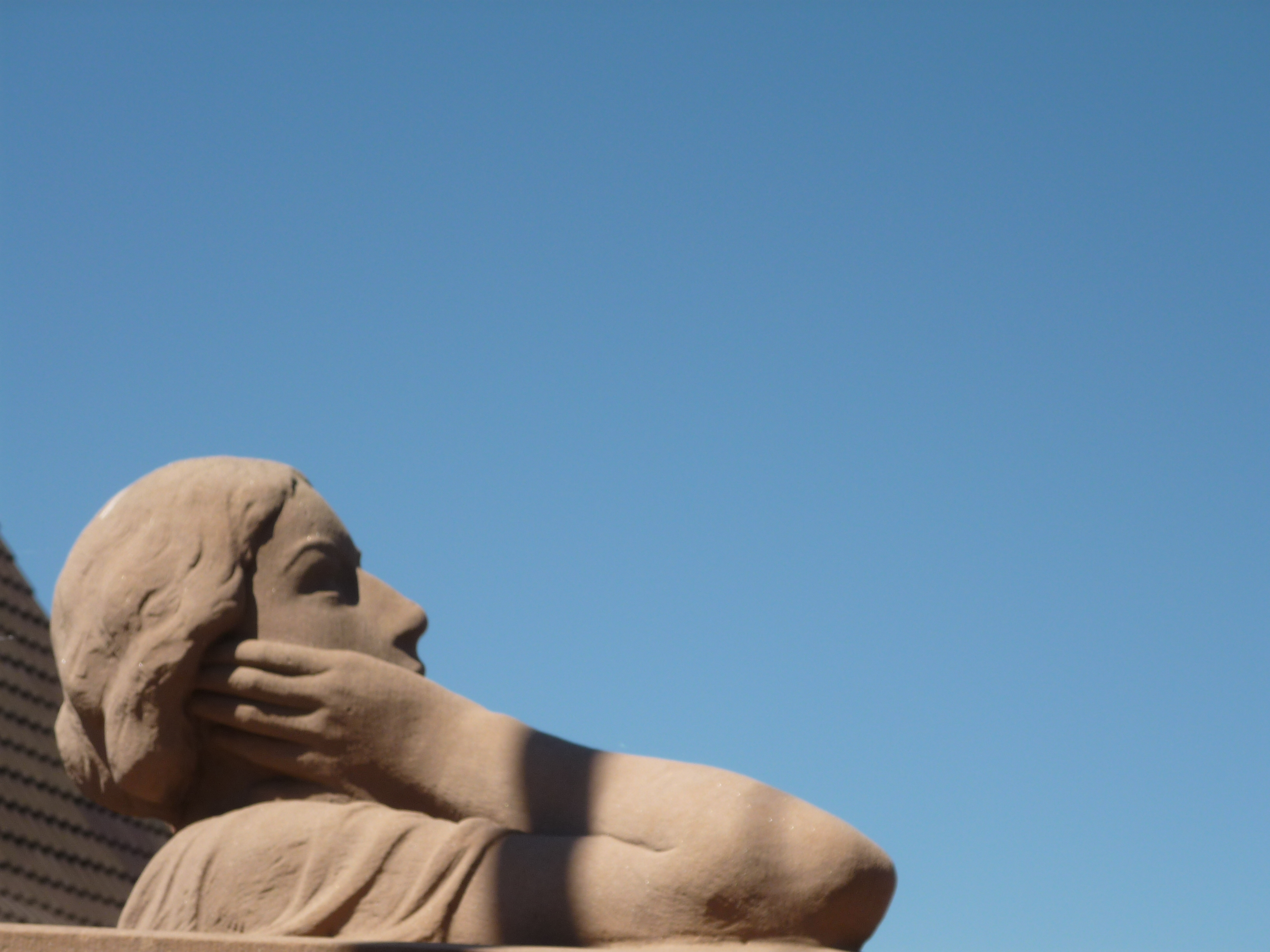 détail monument aux morts de Rountzenheim d'A. Marzolff modèle Emma Weiss